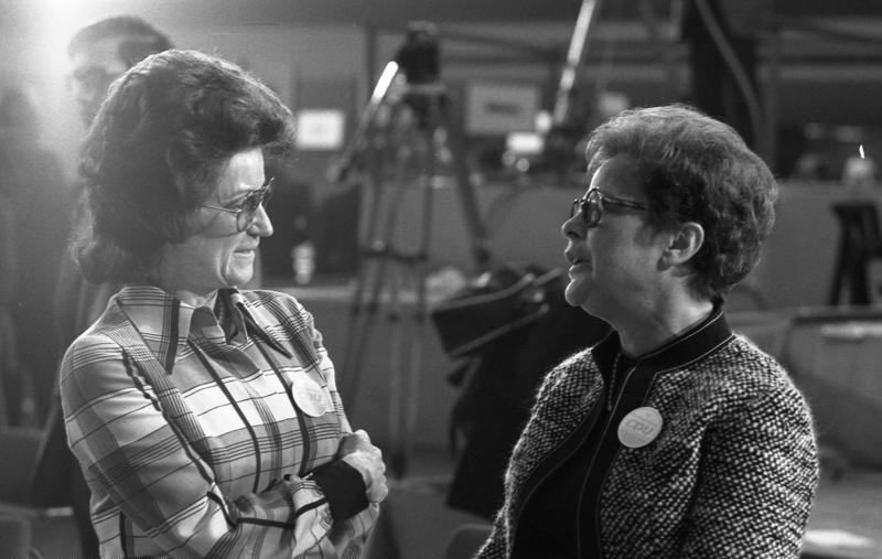 CDU-Parteitag 1972 in der Wiesbadener Rhein-Main-Halle (links: Kriemhild Barzel, rechts: Brigitte Schröder) 9.-11.10.1972